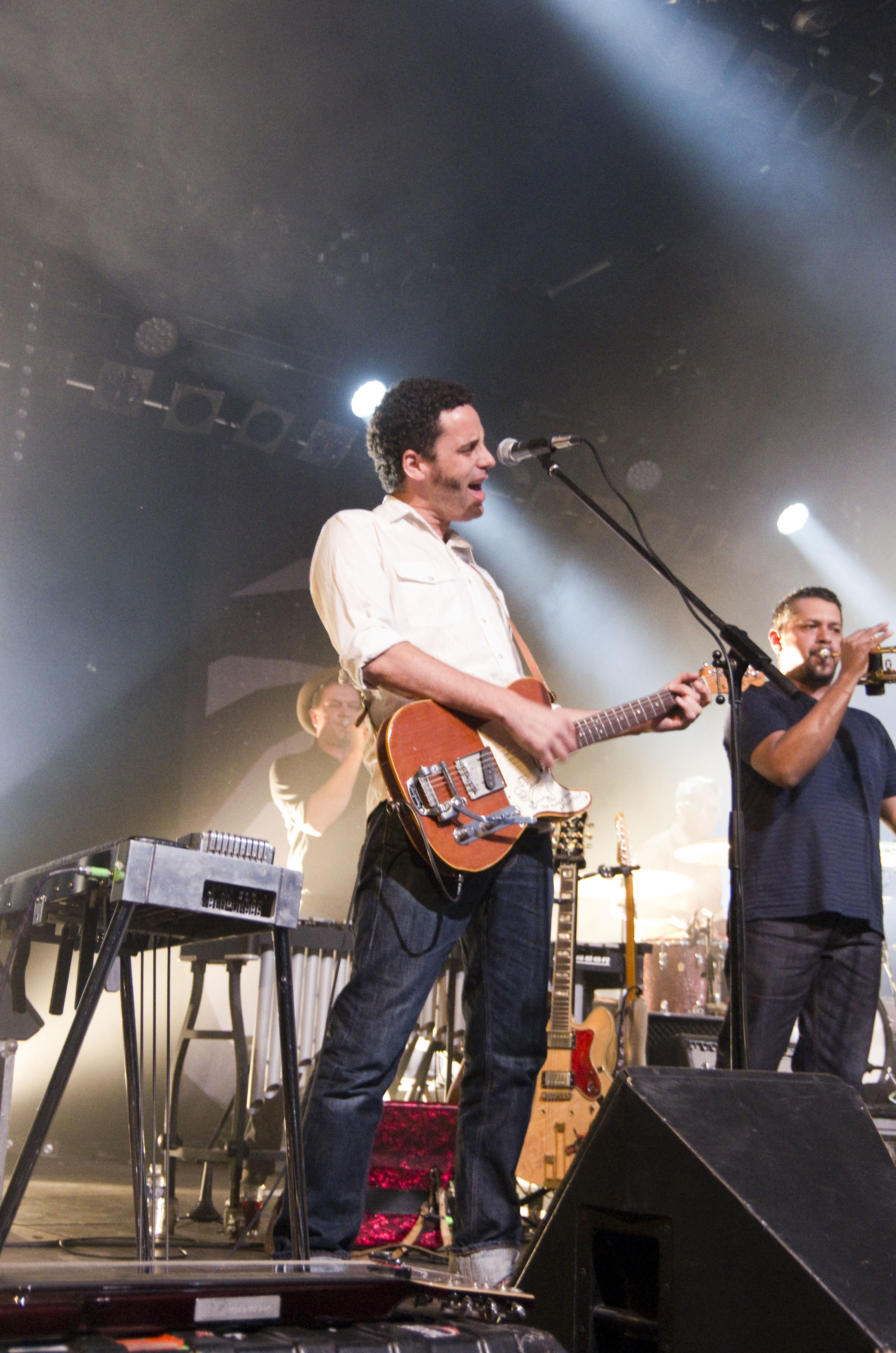 Das Zelt-Musik-Festival 2016 in Freiburg im Breisgau 13.07.2016 Calexico